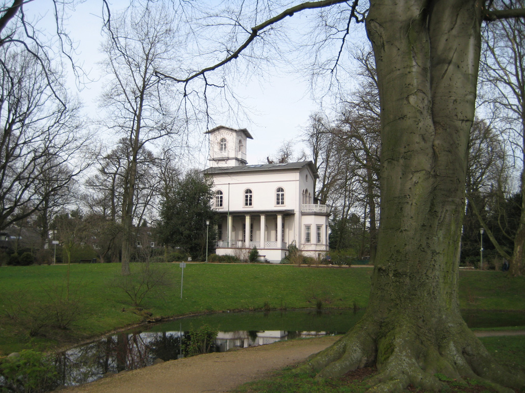 Schönhausenpark mit Haus Schönhausen in Krefeld